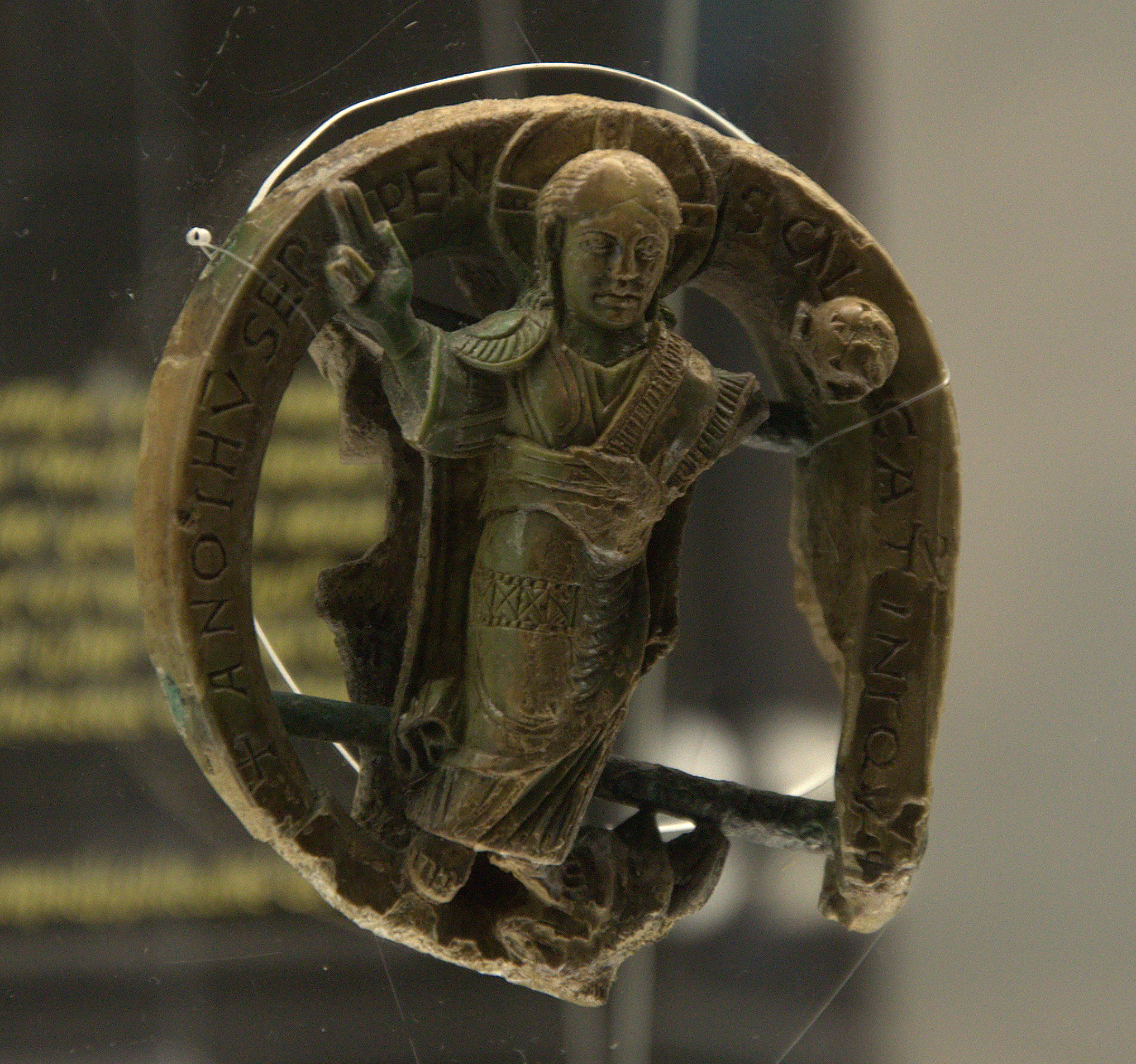 fragment van een 11e-eeuwse kromstaf uit ivoor, gevonden in de intussen verdwenen Sint-Salvatorabdij te Ename, België